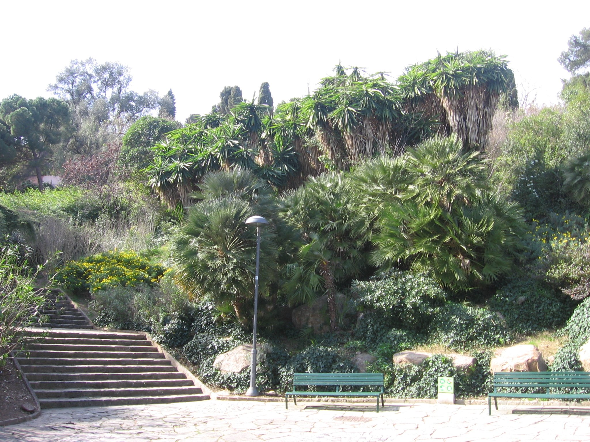 Parque del Putget, Barcelona.